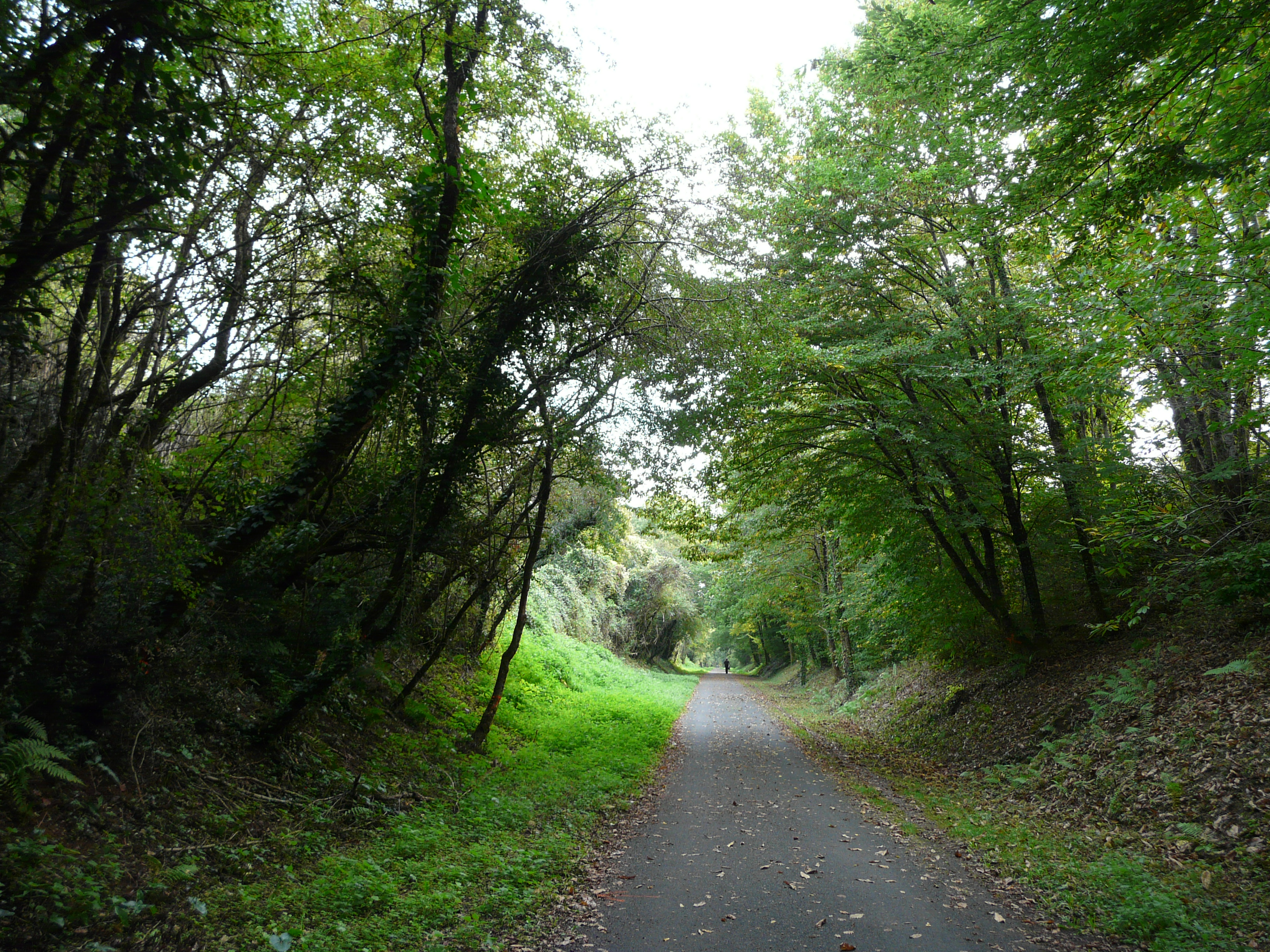 La voie verte Sarlat-Cazoulès à Sarlat-la-Canéda, Dordogne, France.